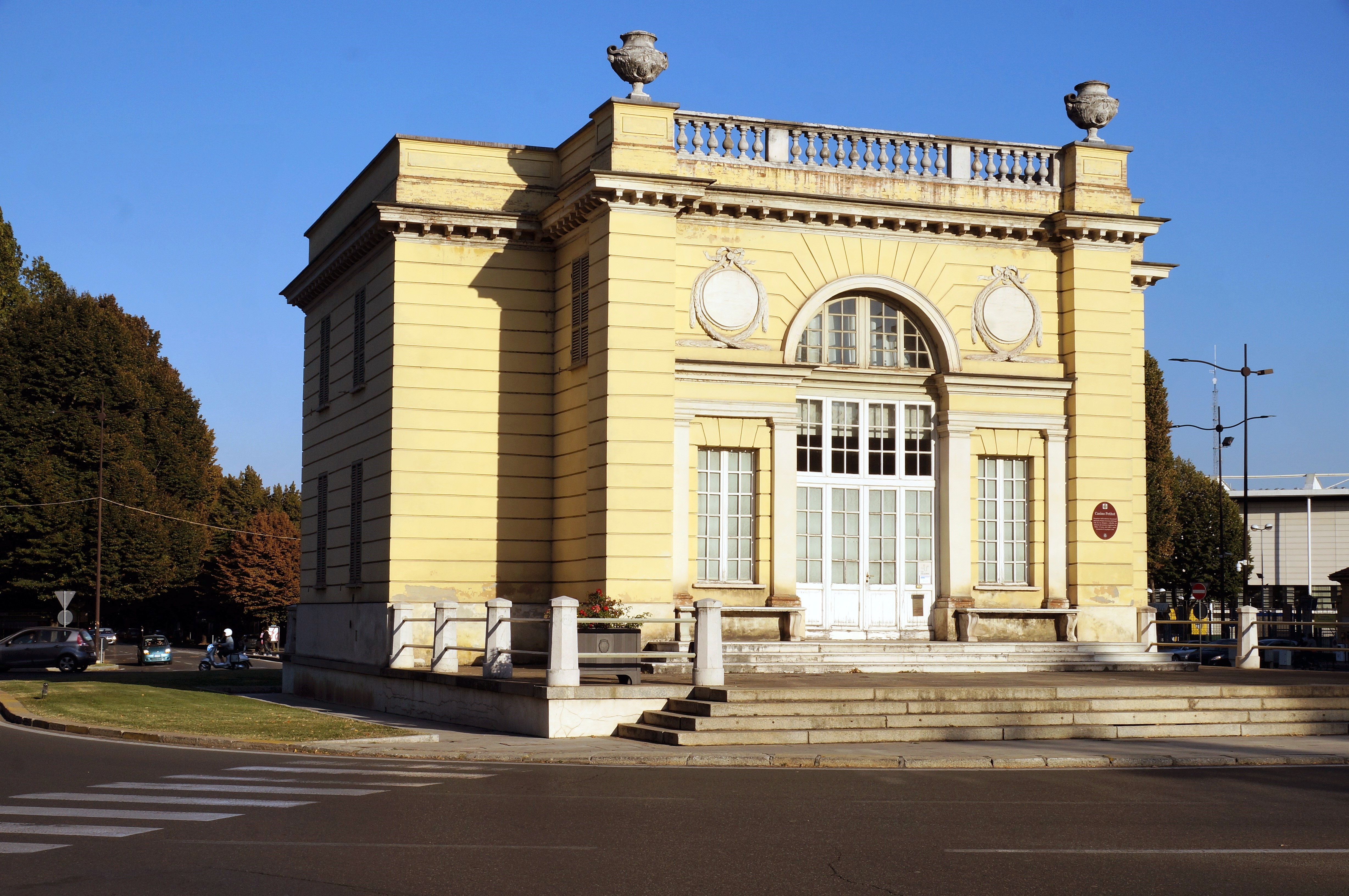 casinetto Petitot This is a photo of a monument which is part of cultural heritage of Italy.